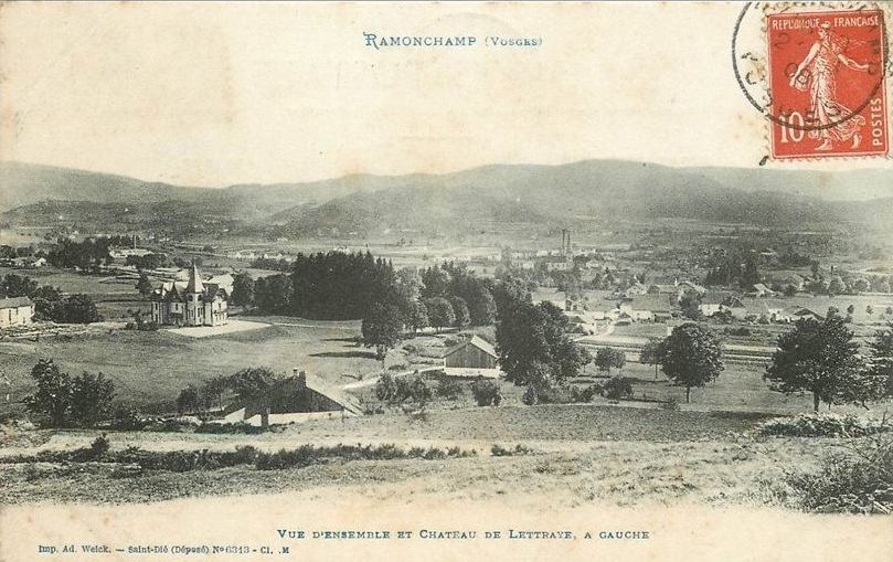 Panorama du village vers 1908